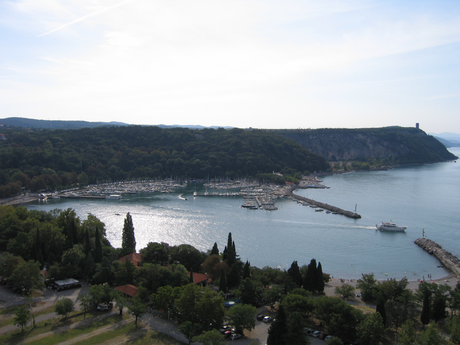 Sistiana (Duino-Aurisina, Trieste, Italia).